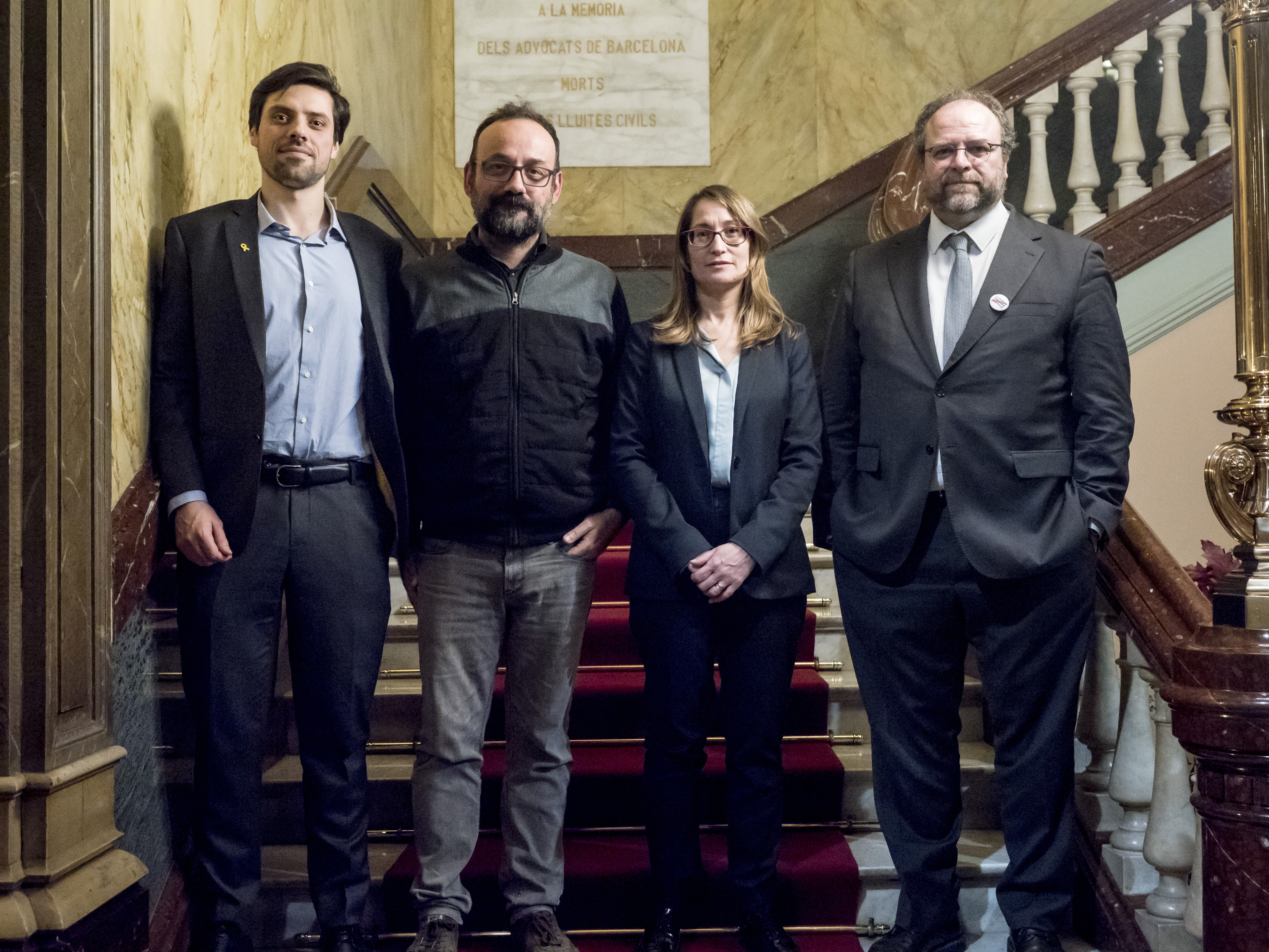 Òmnium ha presentat el seu escrit d'acusació en un acte al Pati de Columnes del Col·legi d'Advocats amb el suport de tot l'equip de defensa del president de l'entitat i més de mig centenar de professionals del món del dret